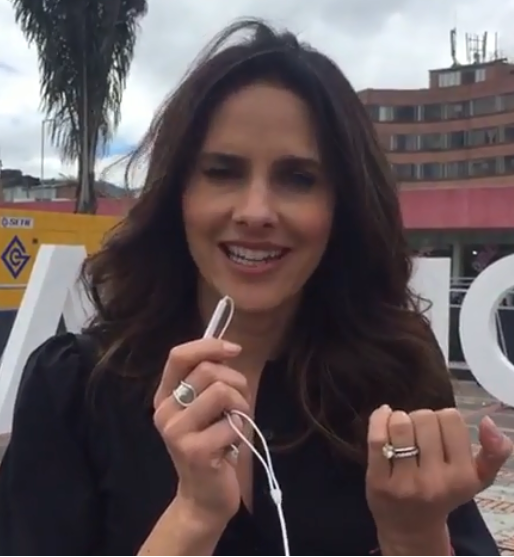 Paola Turbay en un mensaje para la campaña #BajemosElTono en 2017